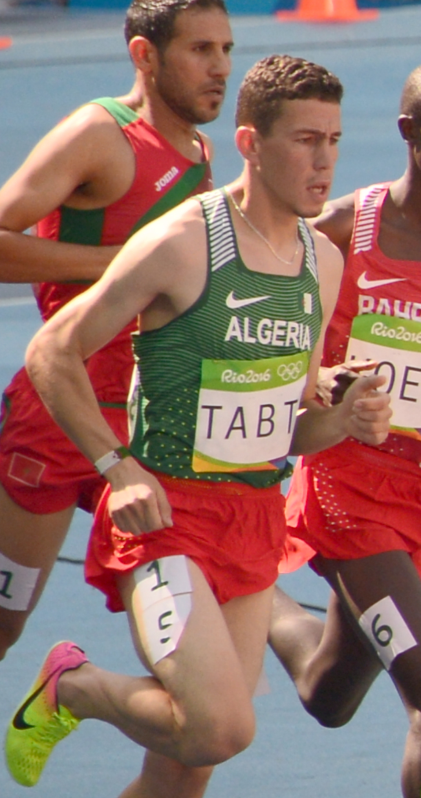 Série du 3000m steeple Homme des JO de Rio, 2016